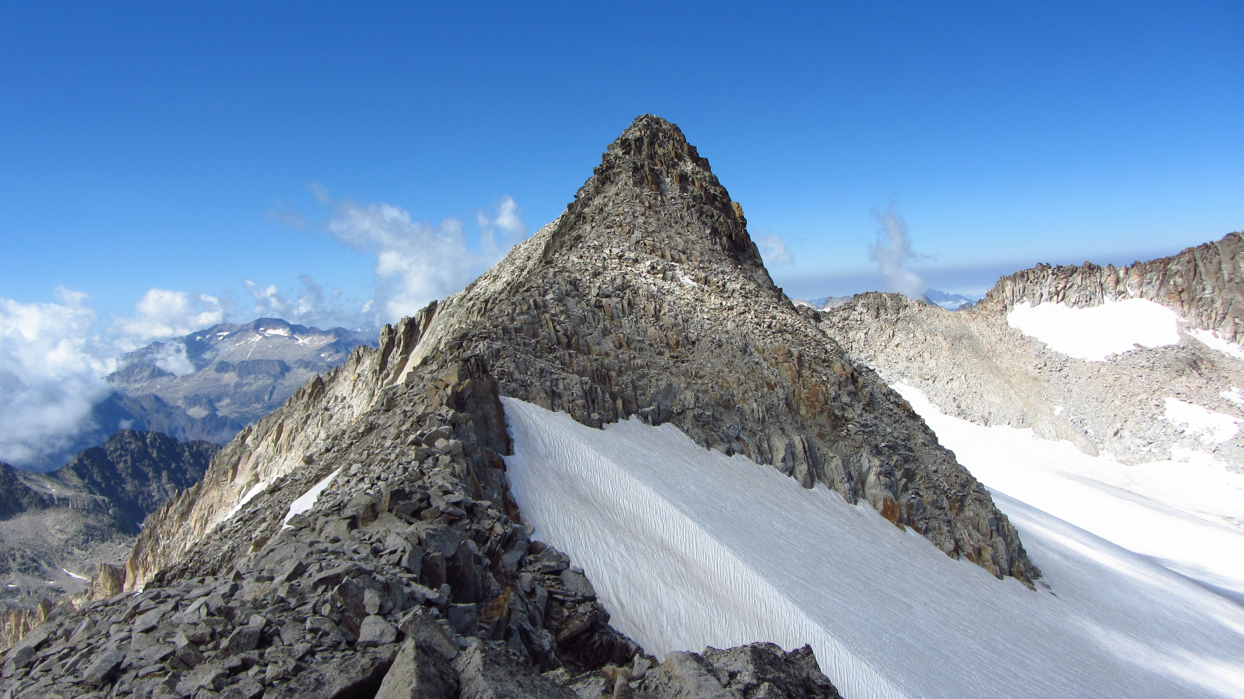 Pic del Mig (3.346 m.) des del Pic de Corones (3.298 m.). Massís de la Maladeta.